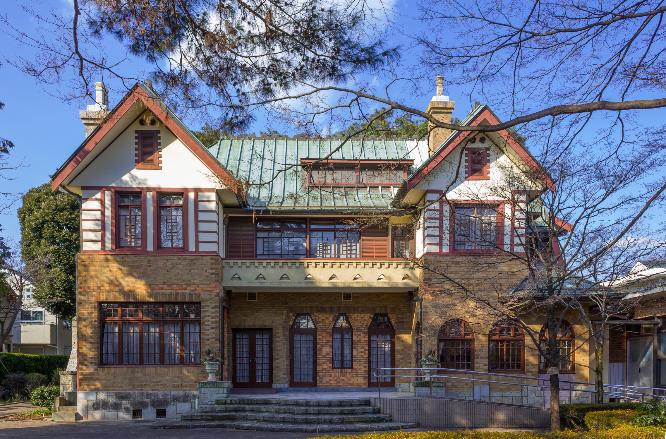 山本有三記念館。旧山本有三邸（三鷹市指定有形文化財）。東京都三鷹市。